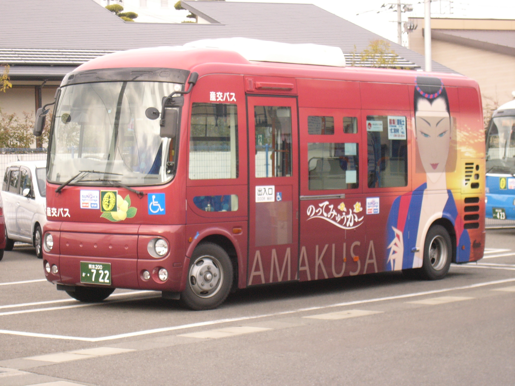 産交バス（本渡市街地循環バス（のってみゅうかー））